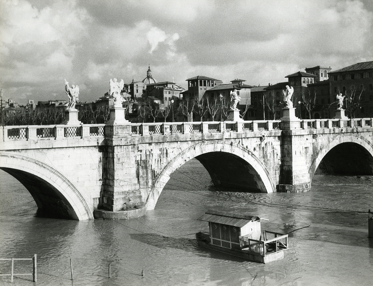 Servizio fotografico : Città del Vaticano, 1975 / Paolo Monti. - Stampe: 3 : Positivo b/n, gelatina bromuro d'argento/ carta, 24x30. - ((Al verso delle stampe manoscritto numero di negativo corrispondente: 241, 278, 2283/33. Sul coperchio della scatola manoscritto a pennarello nero: "Pietre di Roma". - Occasione: Documentazione per il progetto Pietre di Roma che avrebbe dovuto essere pubblicato da Ed. Alfa